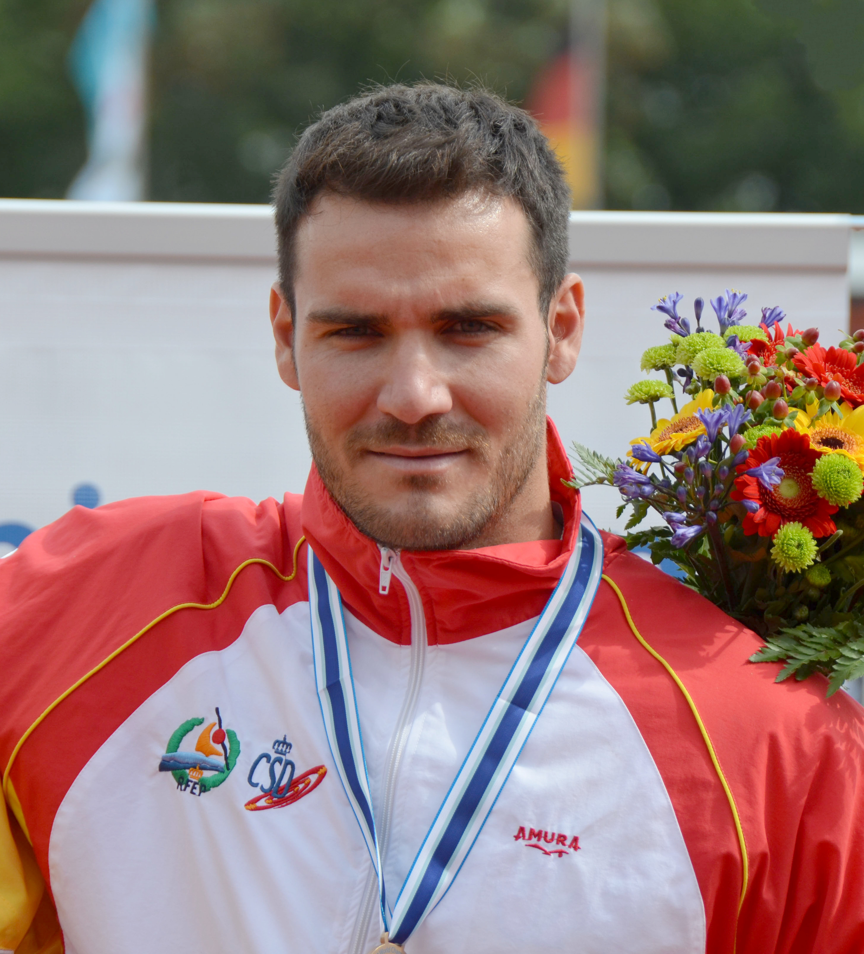 2013 ICF Canoe Sprint World Championships in Duisburg - Alle Ergebnisse/Teilnehmer unter: Gewinner:SWE - SWEDEN ÖSTRÖM, Petter CAN - CANADA DE JONGE, Mark ESP - SPAIN CRAVIOTTO RIVERO, Saúl